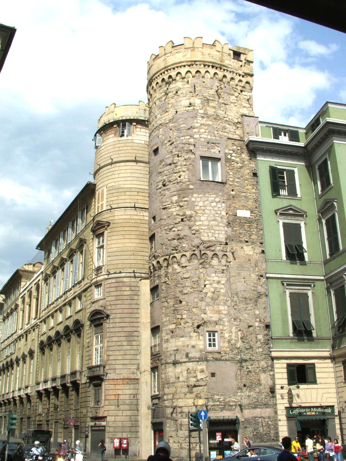 Genova, immagine dal porto antico, piazza Caricamento